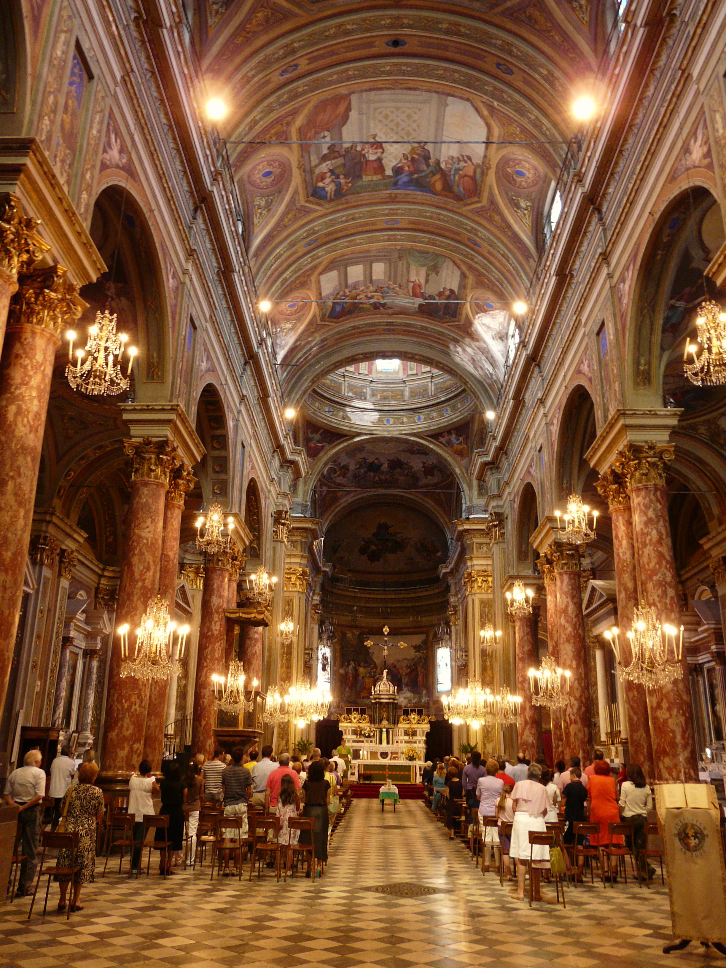 Interni della chiesa di Nostra Signora Assunta, Ovada, Piemonte, Italia